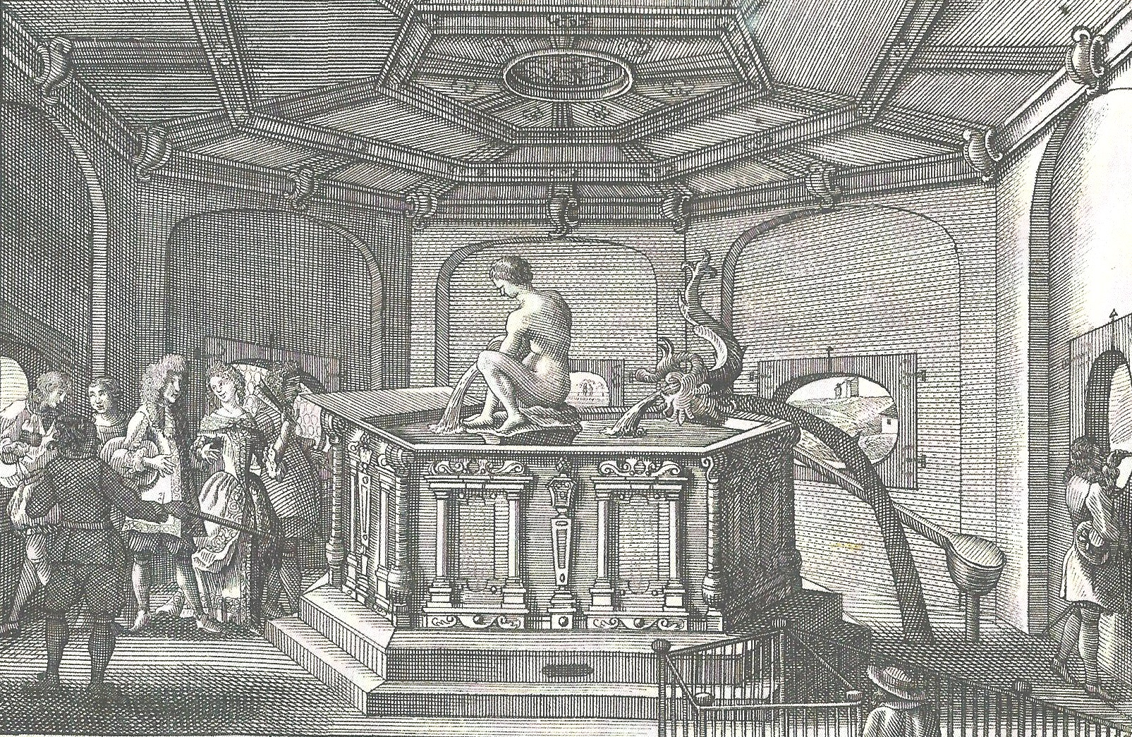 Wasserbecken im Kastenturm (Augsburg). Kupferstich von Simon Grimm